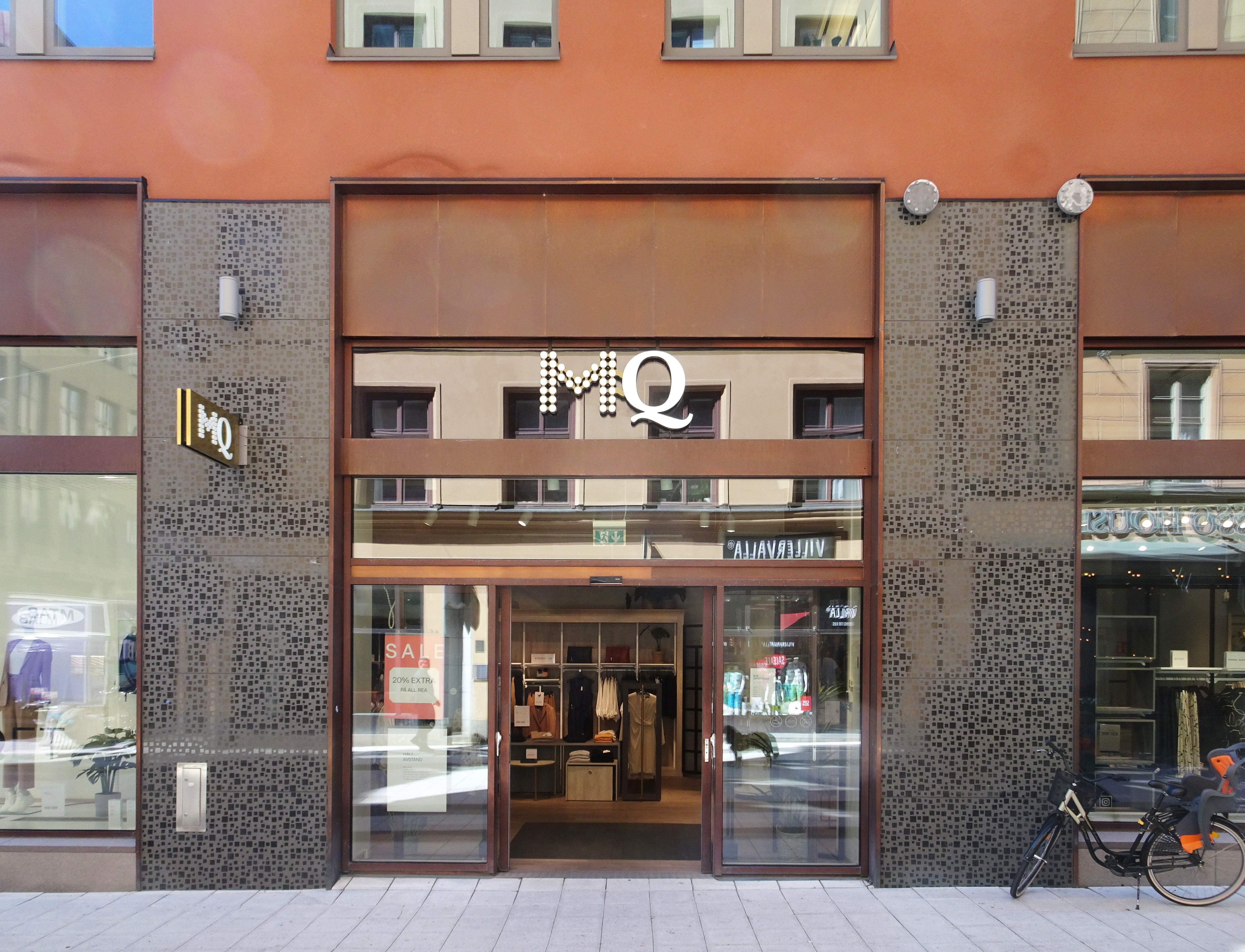 Drottninggatan 19-21, kv Björnen, AOS arkitektkontor (1981) senare påbyggd.